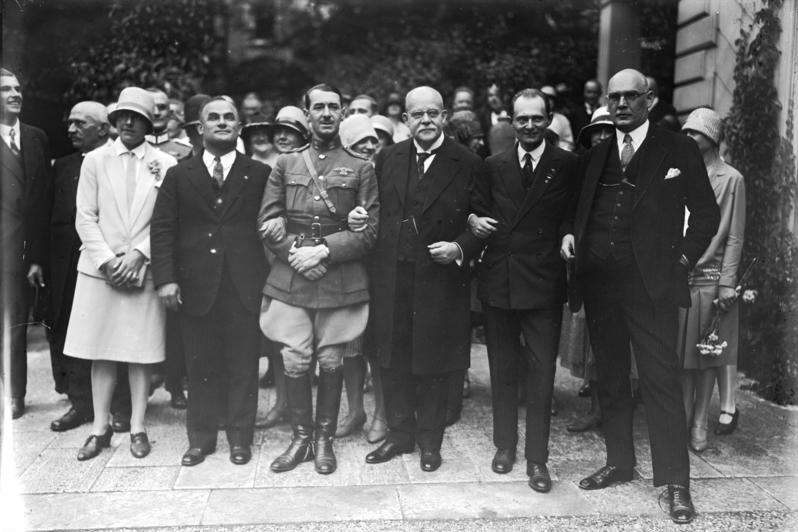 Jubelnder Empfang der Bremer-Flieger in Berlin! Der Empfang der Bremer -Flieger beim Reichskanzler Dr. Marx, v.li.n.re.: Frau Hauptmann Köhl, Hauptmann Köhl, Major Fitzmaurice, Reichskanzler Dr. Marx , Freiherr von Hünefeld, Reichsfinanzminister Dr. Köhler, Arm in Arm im Garten des Reichskanzler-Palais.